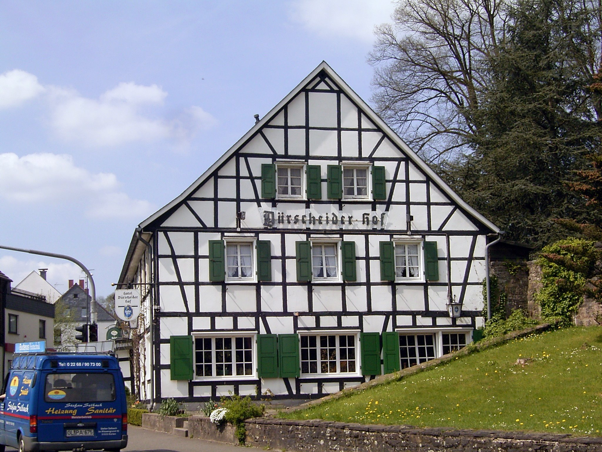 Kürten - Dürscheid